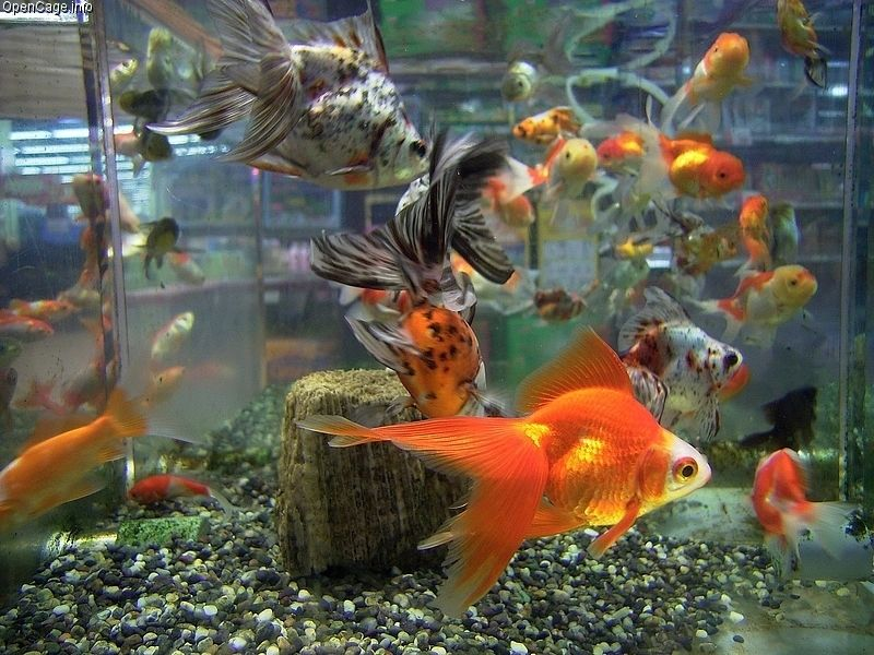 Diversas variedades de Carassius auratus a la venta